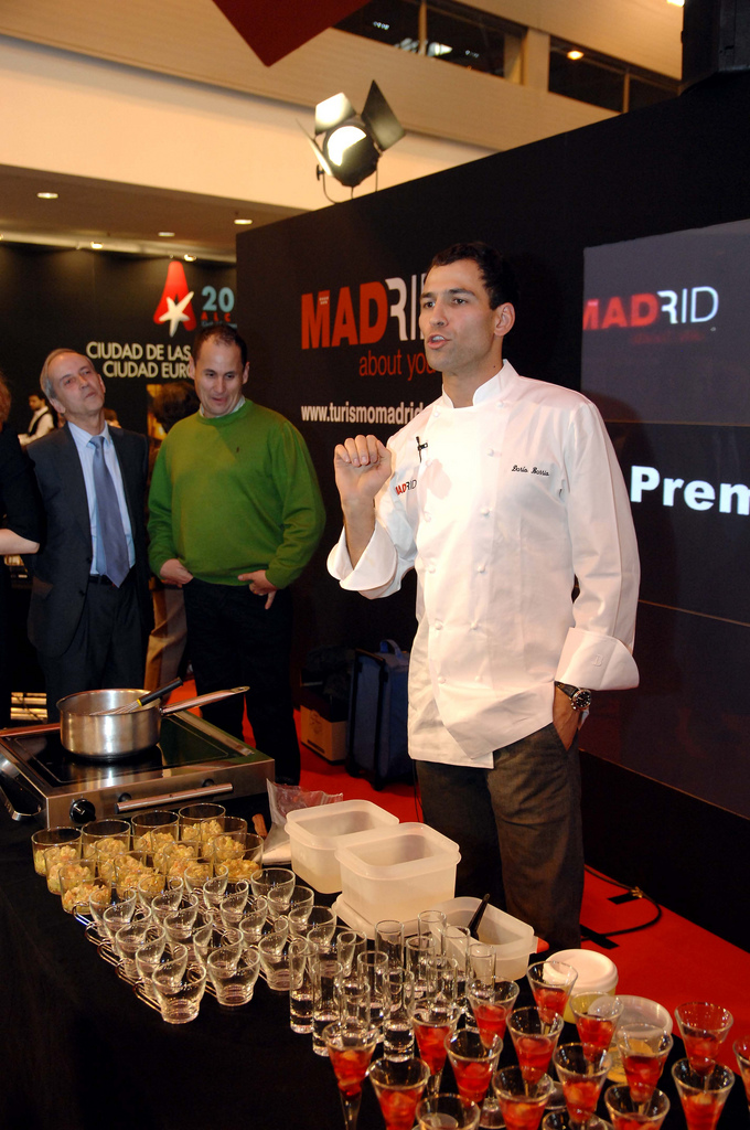 El chef Darío Barrio en FITUR 2009